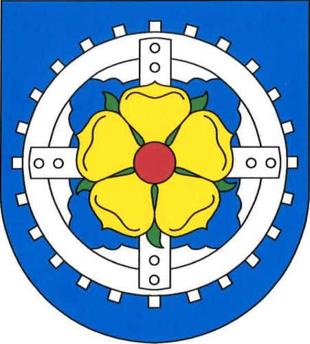 Řídelov znak